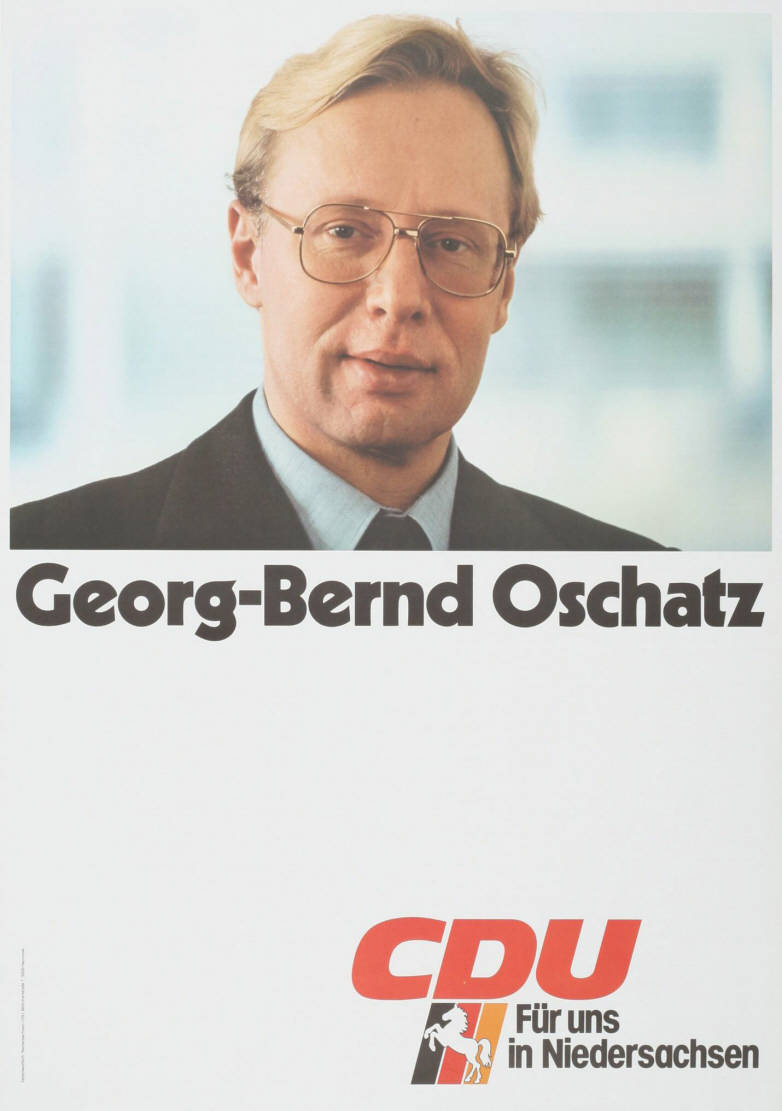 Georg-Bernd Oschatz CDU Für uns in Niedersachsen Abbildung: Porträtfoto Kommentar: s. auch LTW NDS 1982 Plakatart: Kandidaten-/Personenplakat mit Porträt Auftraggeber: Verantw.: Niedersachsen-CDU, Hannover Objekt-Signatur: 10-001: 2578 Bestand: Plakate zu Bundestagswahlen (10-001) GliederungBestand10-18: Plakate zu Bundestagswahlen (10-001) » Die 10. Bundestagswahl am 6. März 1983 » CDU » Mit Porträtfoto Lizenz: KAS/ACDP 10-001: 2578 CC-BY-SA 3.0 DE